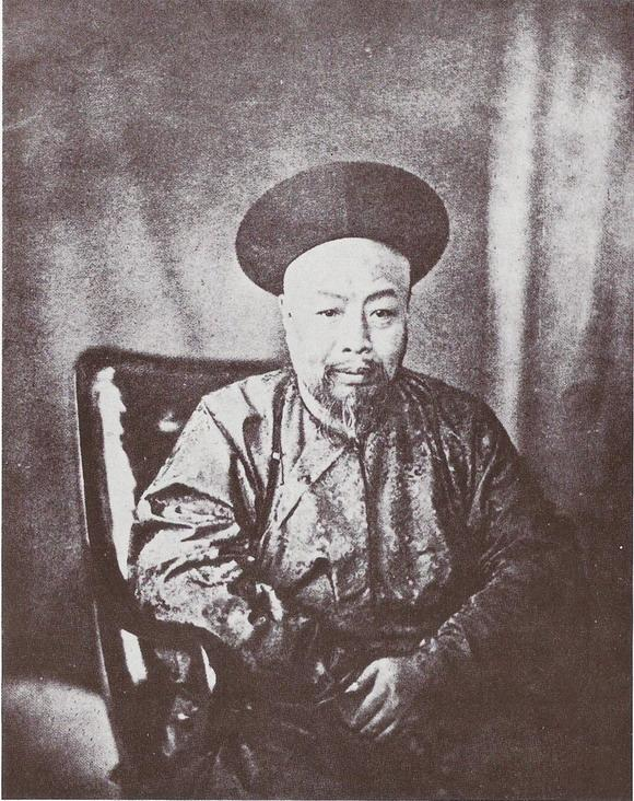 Ye Mingchen (1807–1859)